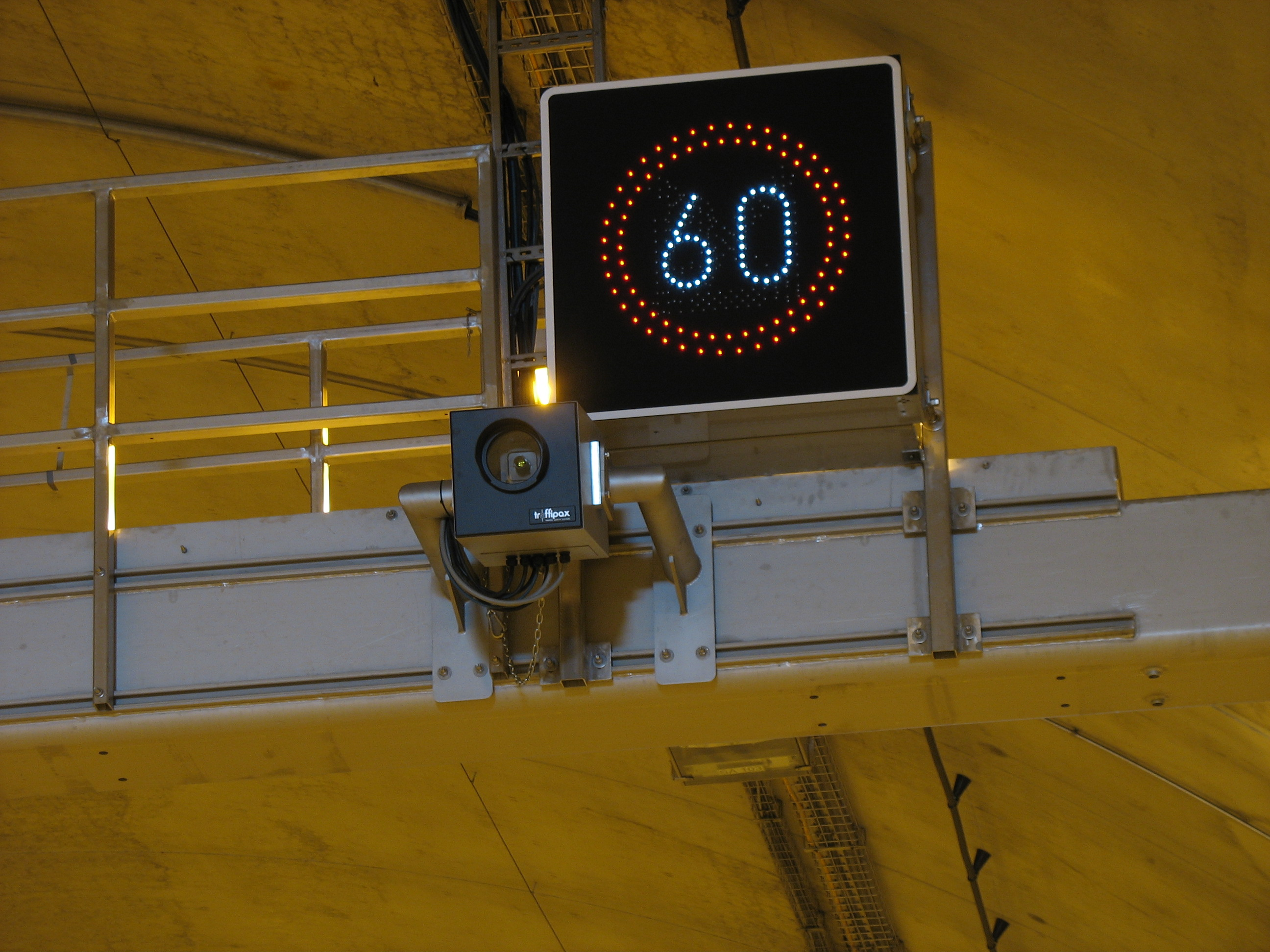 Geschwindigkeitsmessende Verkehrsüberwachungsanlage TraffiStar S330 in einem Tunnel